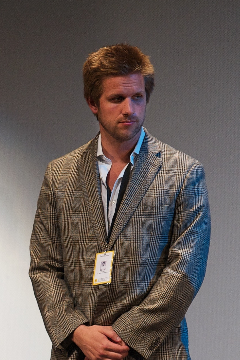 Foto av Carsten Aniksdal.